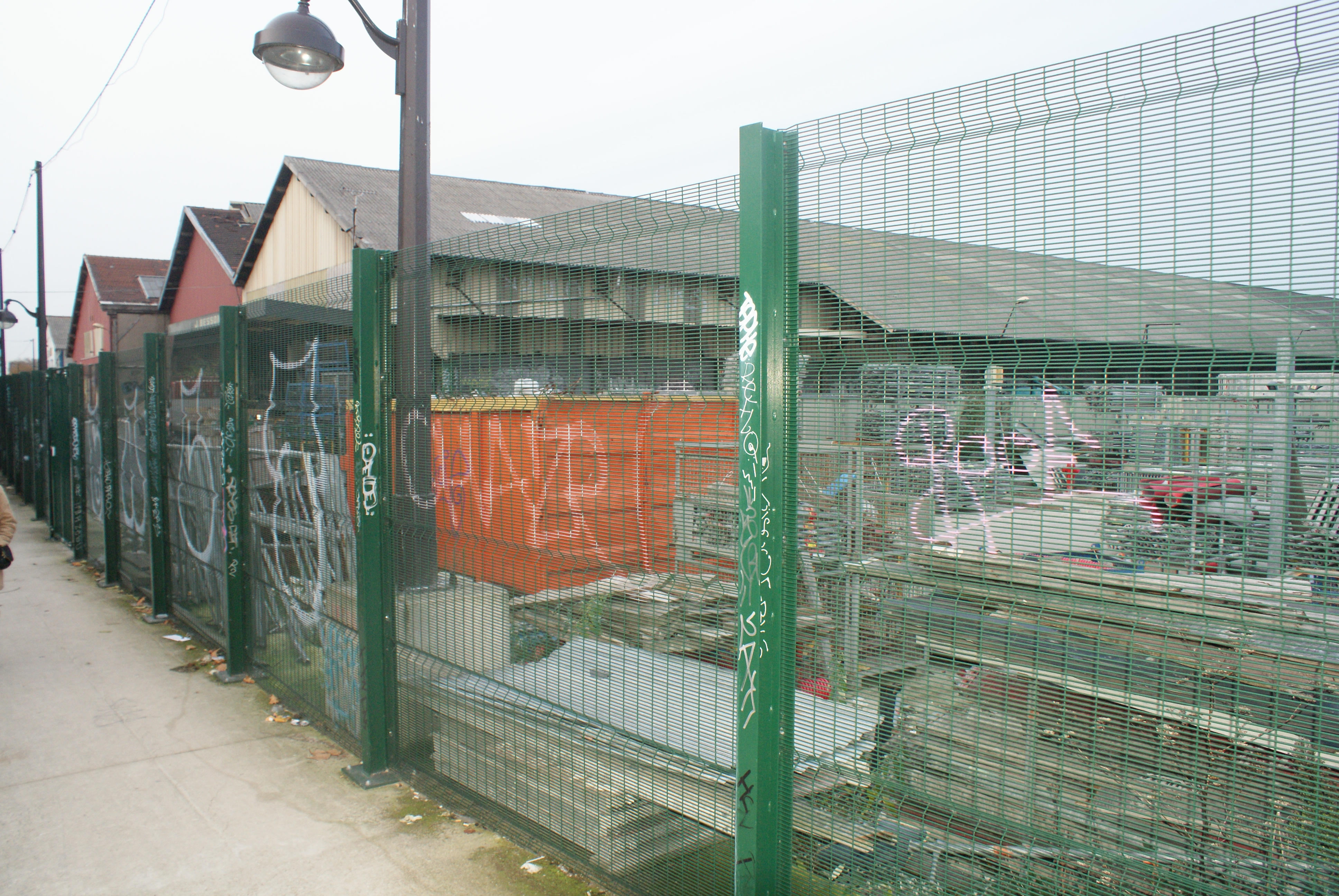 gare de La Rapée Supérieure, futur secteur Bercy-Charenton, en novembre 2016. Vue prise depuis la liaison provisoire entre le boulevard Poniatowski et la station Cour Saint-Émilion (ligne 14 du métro)